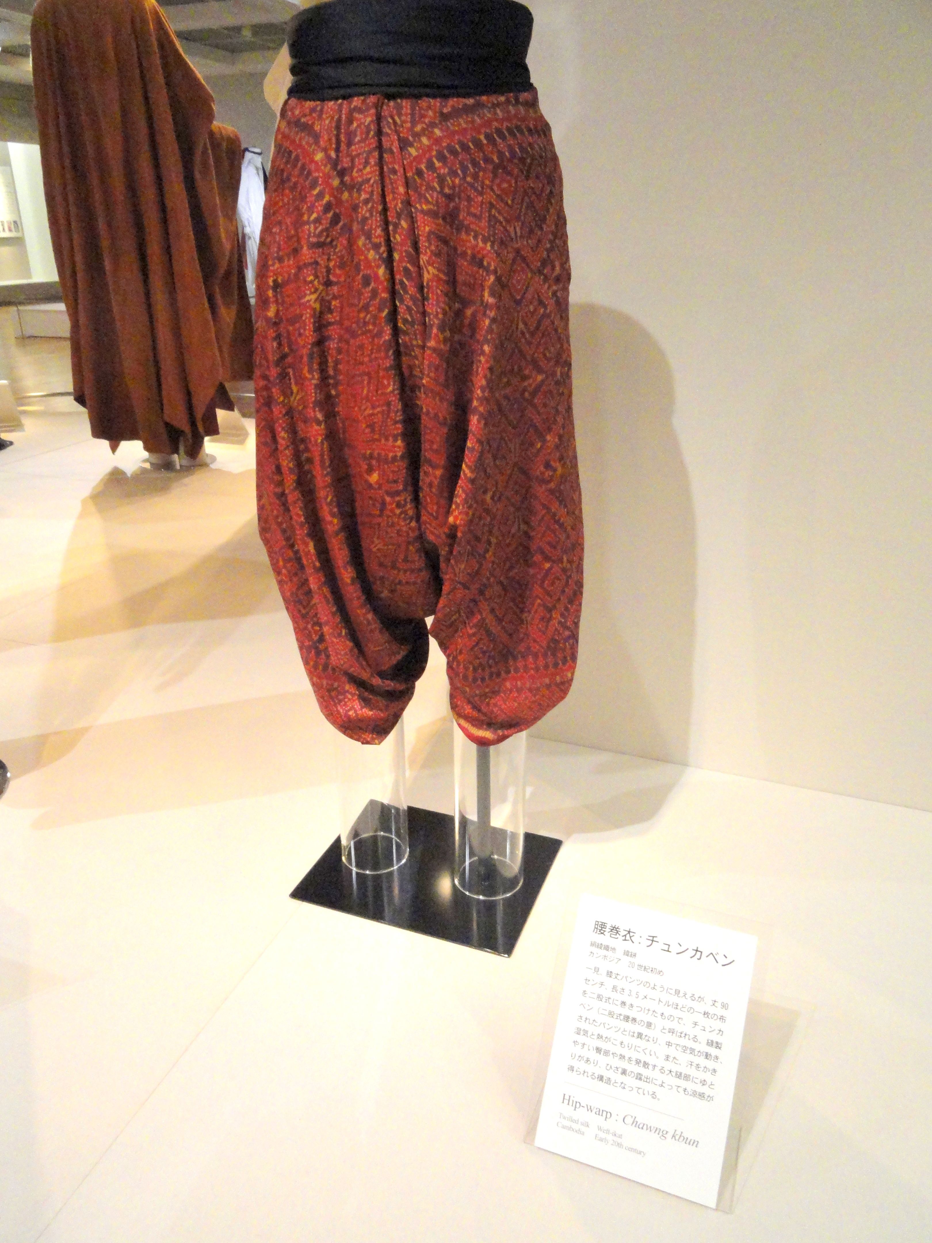 Exhibit in Bunka Gakuen Costume Museum, 3-22-7 Yoyogi, Shibuya-ku, Tokyo, Japan.